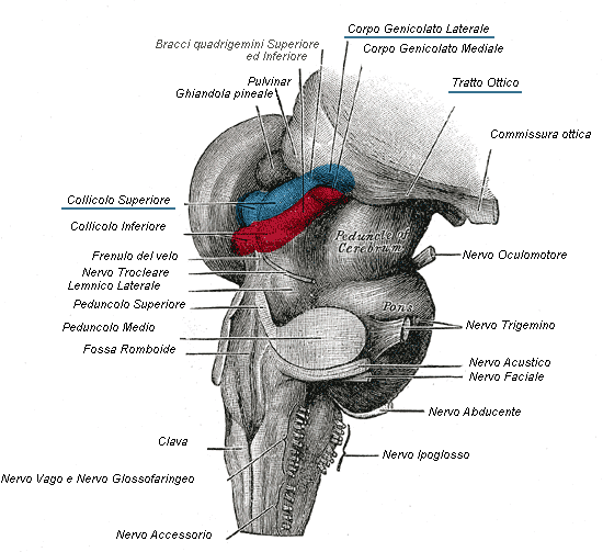 Tronco dell'encefalo; in evidenza strutture connesse con la sensibilità visiva e uditiva.